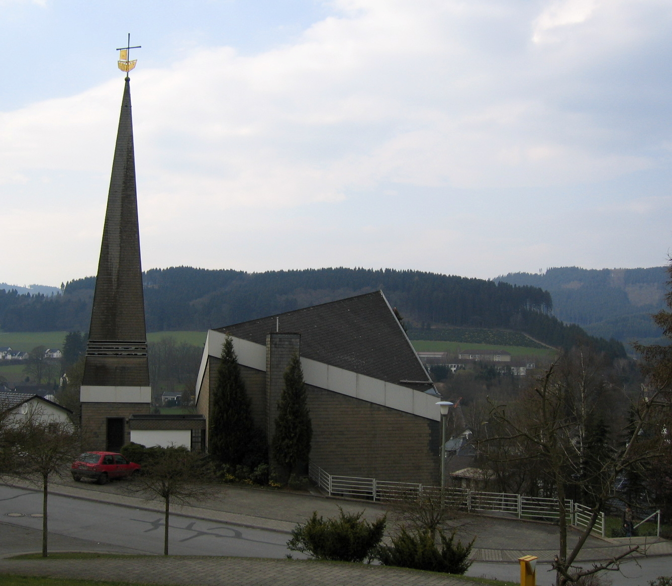 Evangelische Kirche „Sankt Johannis“ (erbaut 1972) in Eslohe.